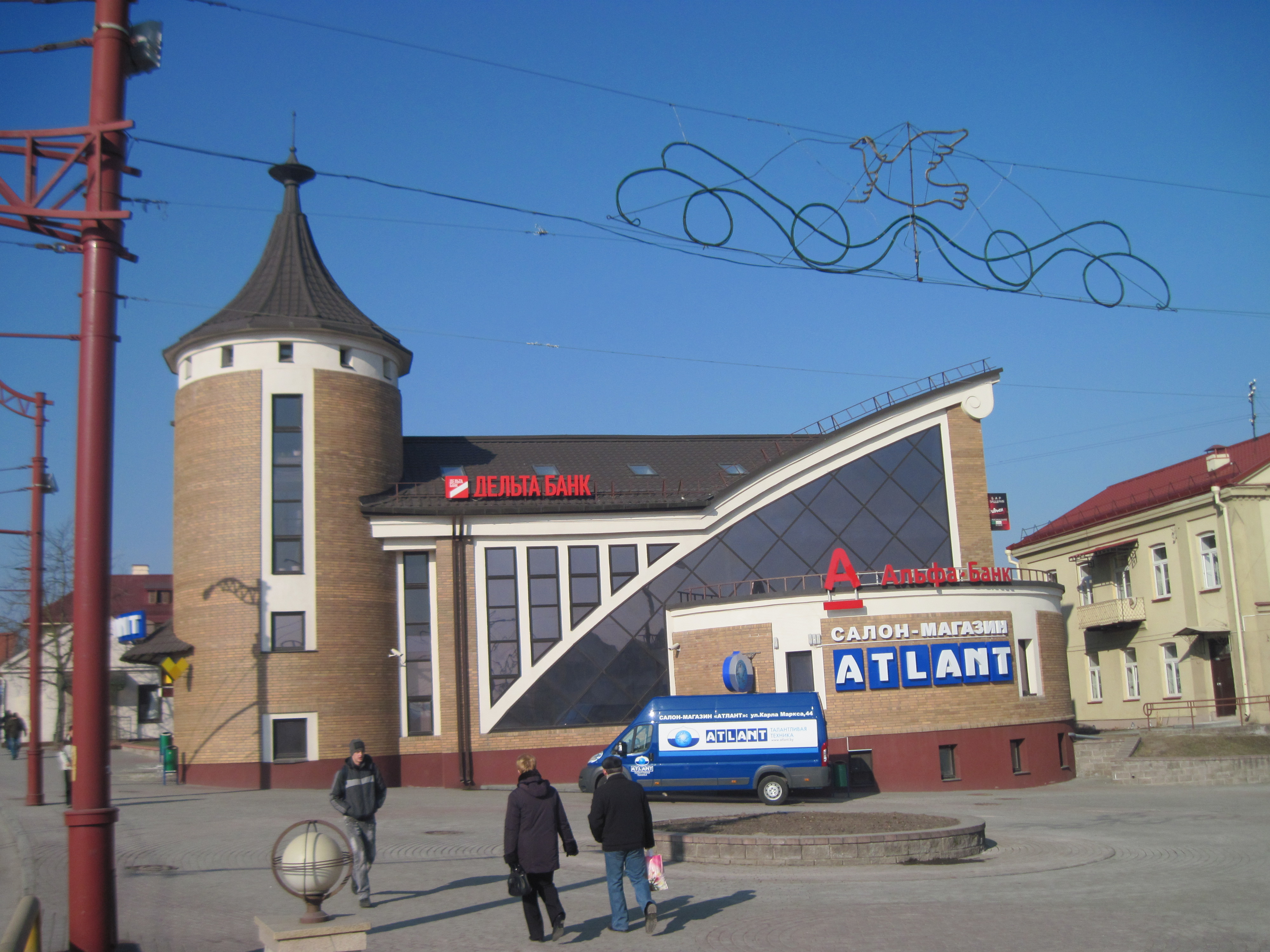 Забудова гістарычнага цэнтра Гродна, вуліца К. Маркса, 40А